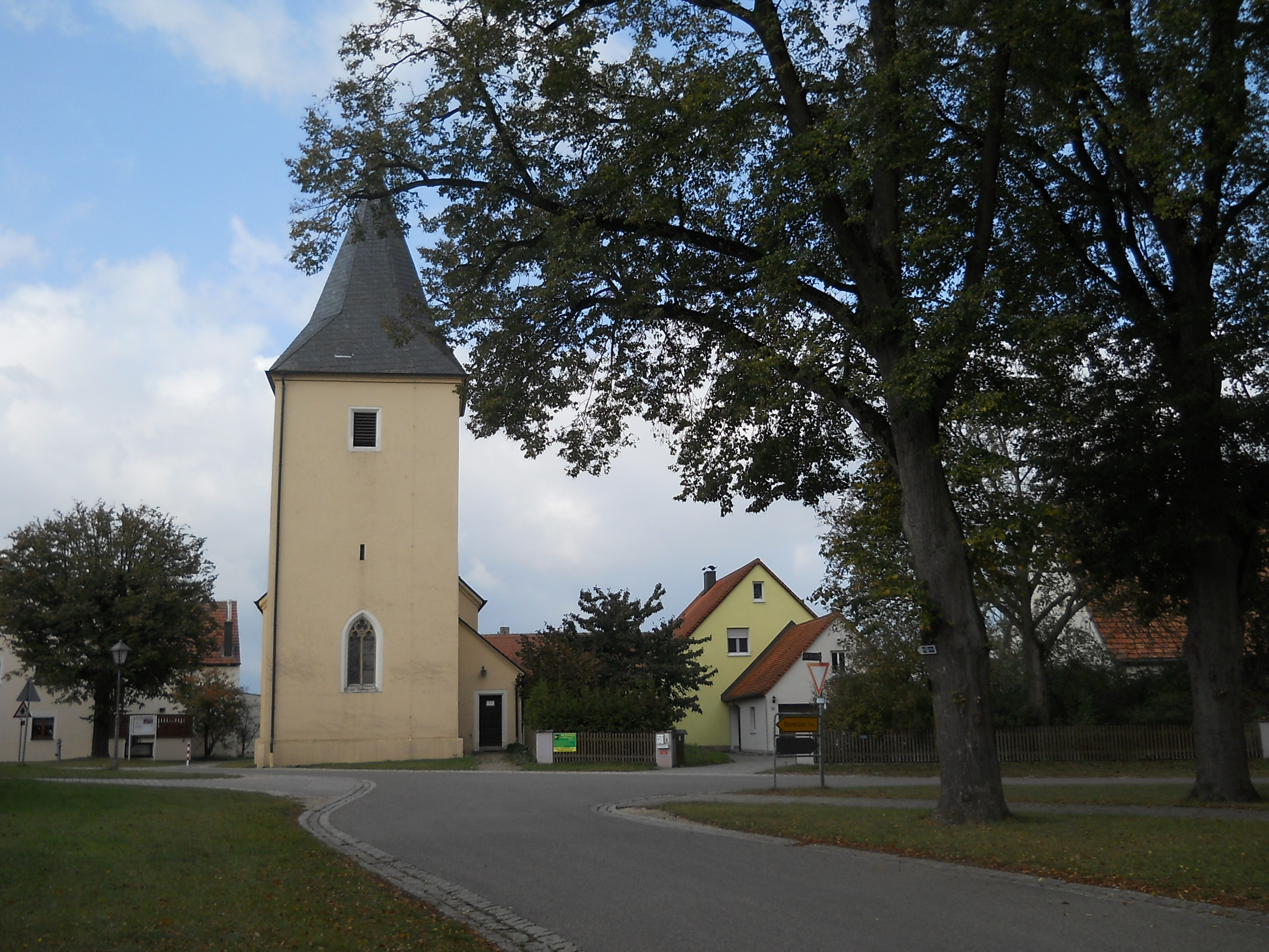 Oberasbach, Ortsteil von Gunzenhausen im Landkreis Weißenburg-Gunzenhausen (Bayern), Evang.-luth. Kirche St. Wolfgang